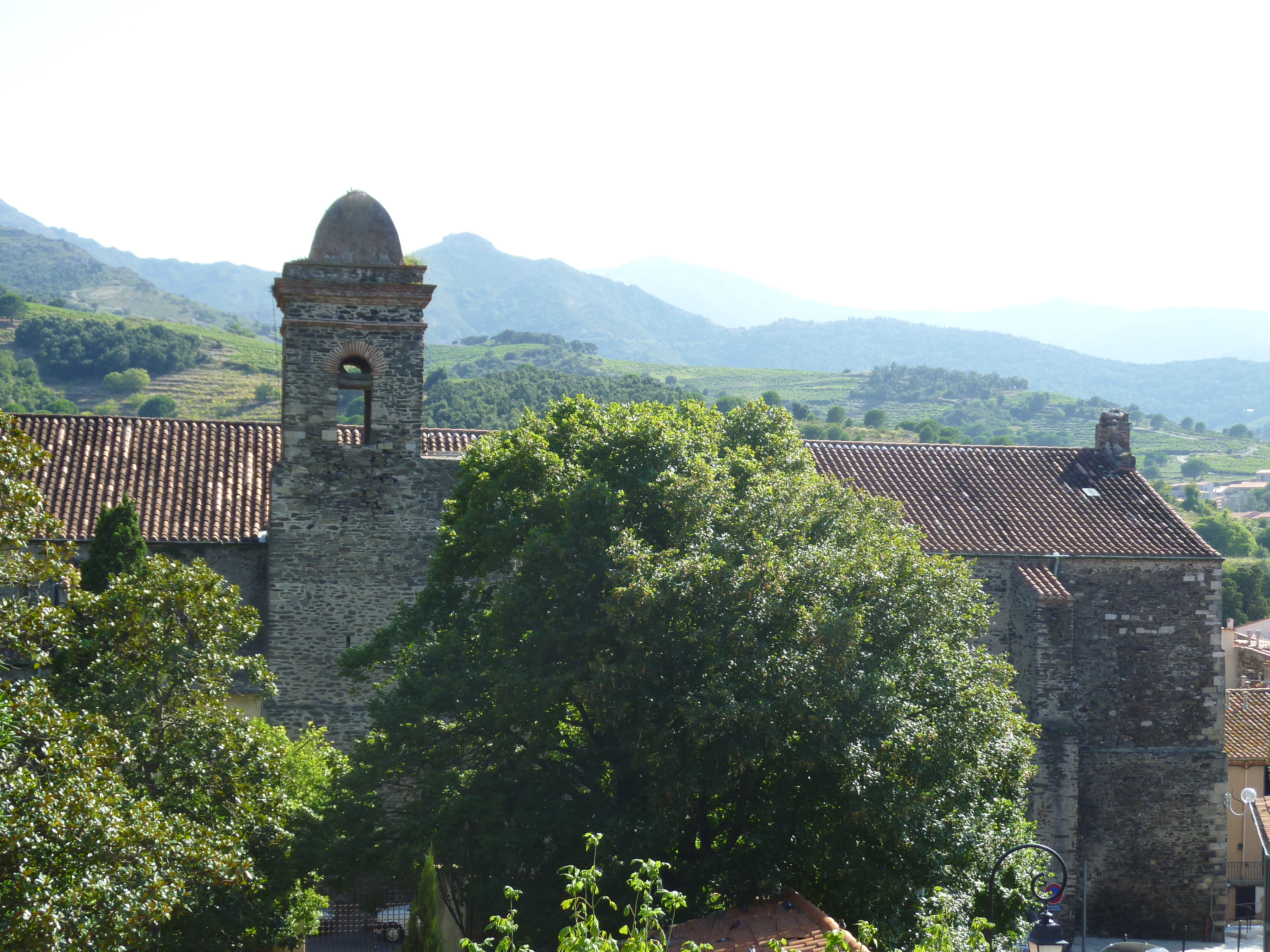 Ancienne église des Dominicains (Collioure, Pyrénées-Orientales, France) .